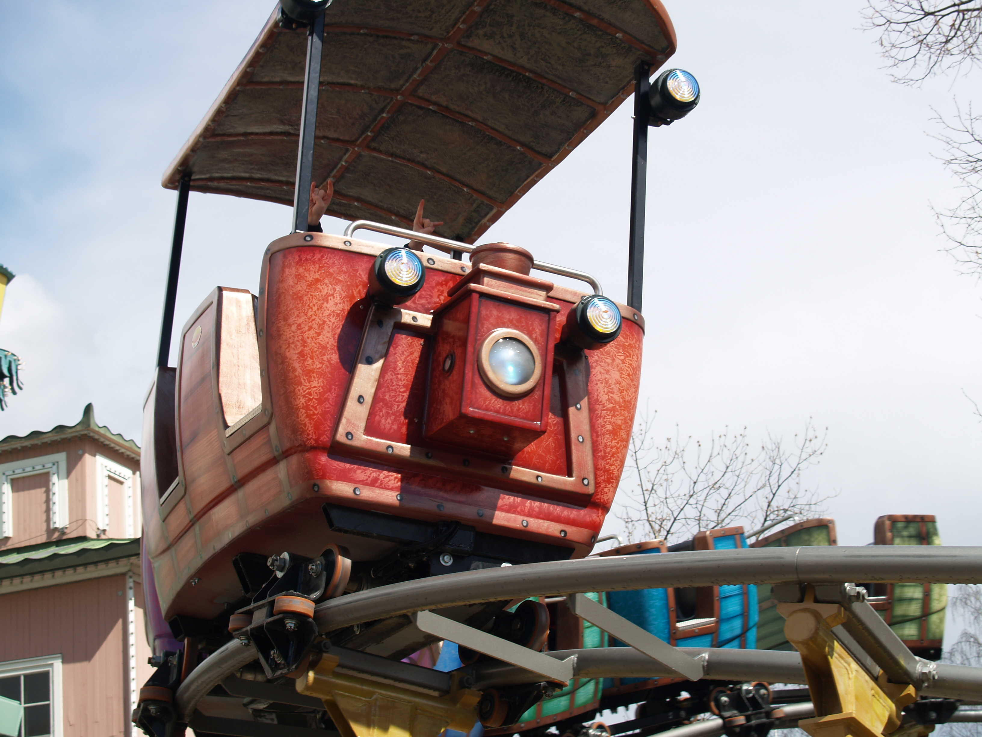 Åkattraktionen Stampbanan i nöjesparken Liseberg, Göteborg.